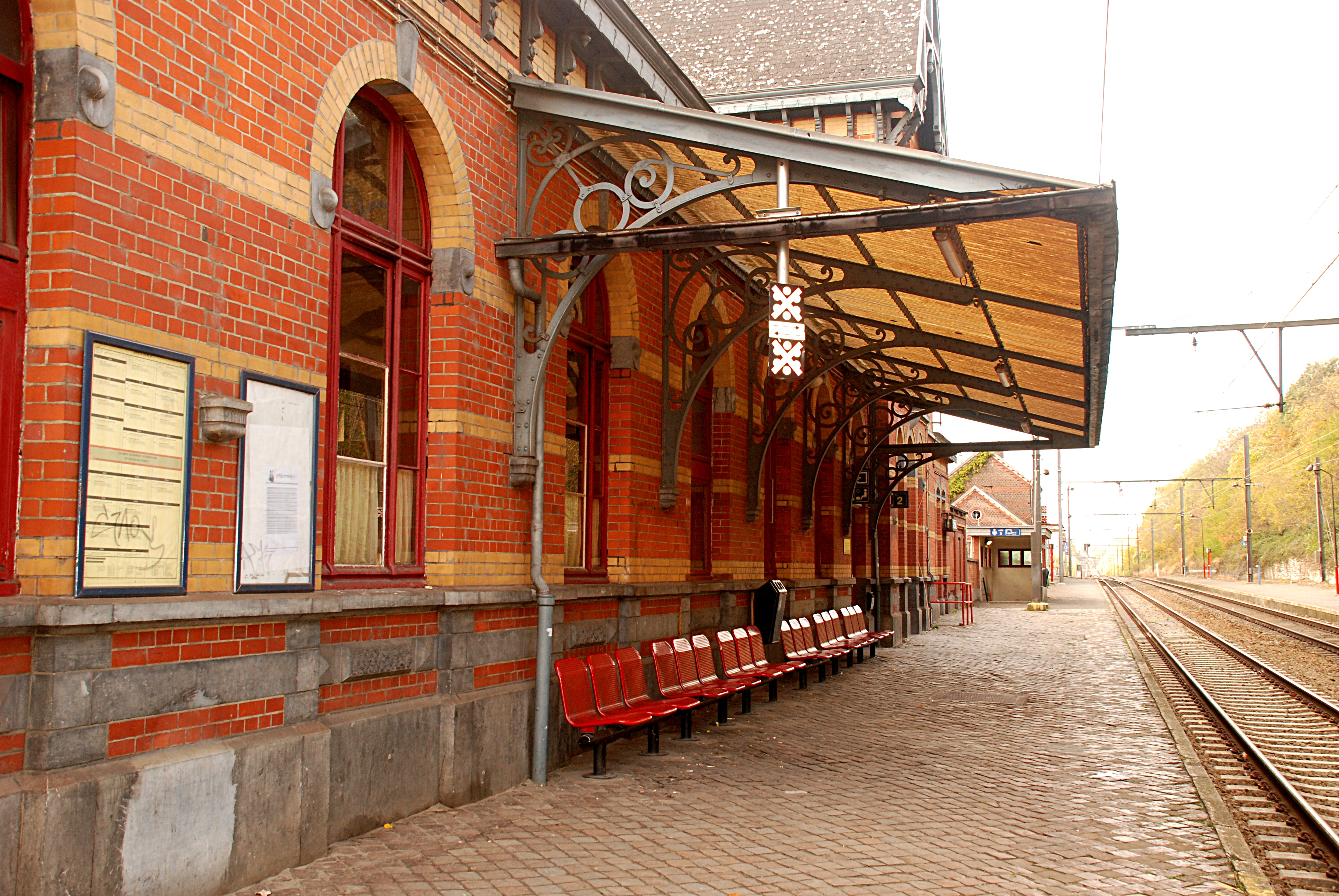 Gare de Genval (Art nouveau) : marquise